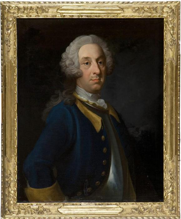 Rutger Barnekow (1695-1772) iklädd uniform och harnesk för en officer vid Norra Skånska kavalleriregementet. Porträtt av Olof Arenius, ca 1740.